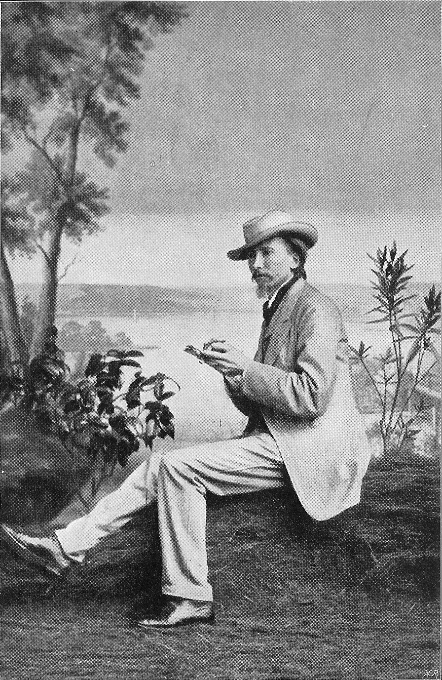 Vilhelm Bergsøe som studerende ved Københavns Universitet.